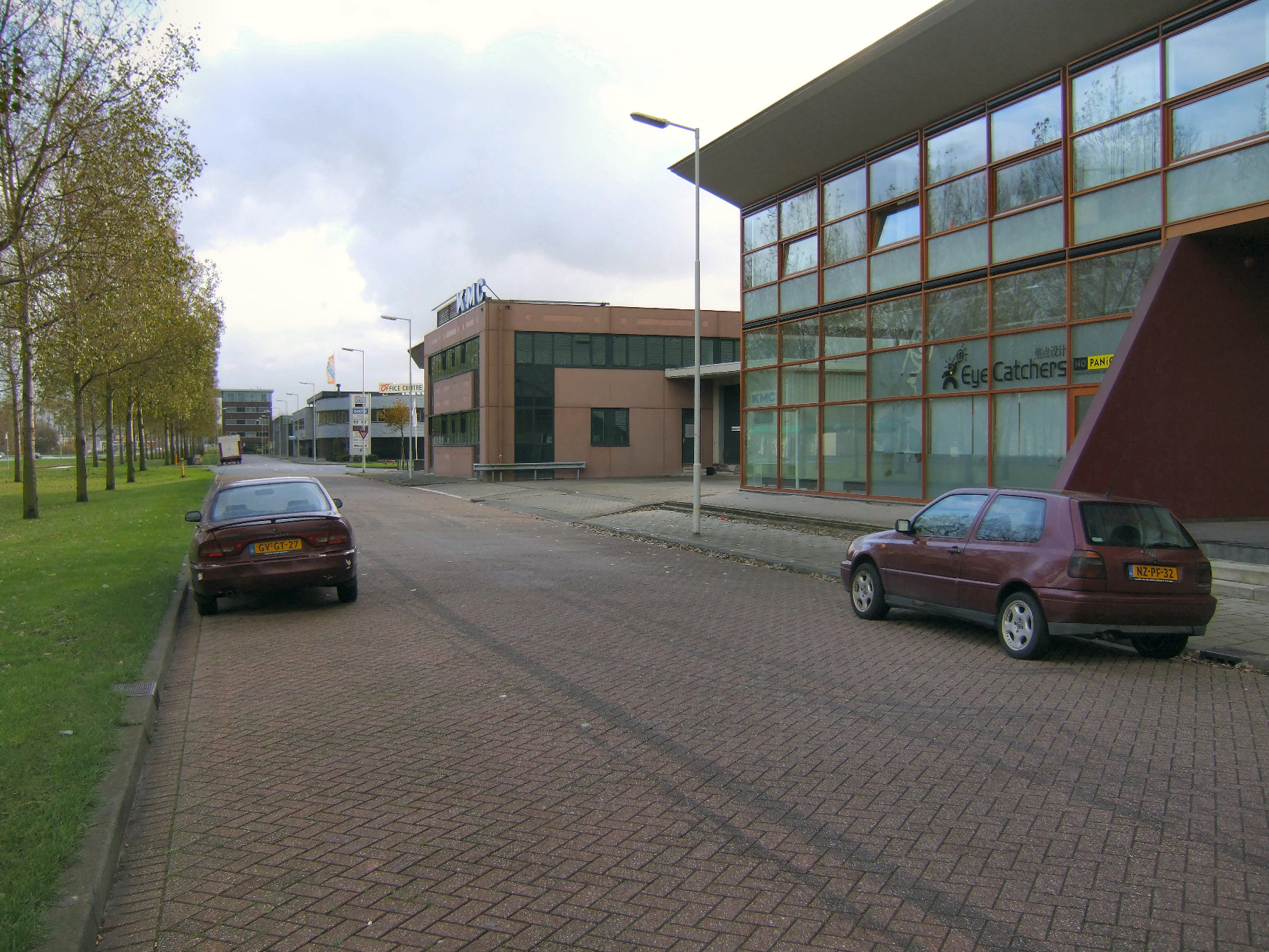 Pittsburghstraat in Bedrijvenpark Noord-west in Rotterdam, foto van 12 november 2006 Licensing Categorie:Afbeelding straat in Rotterdam